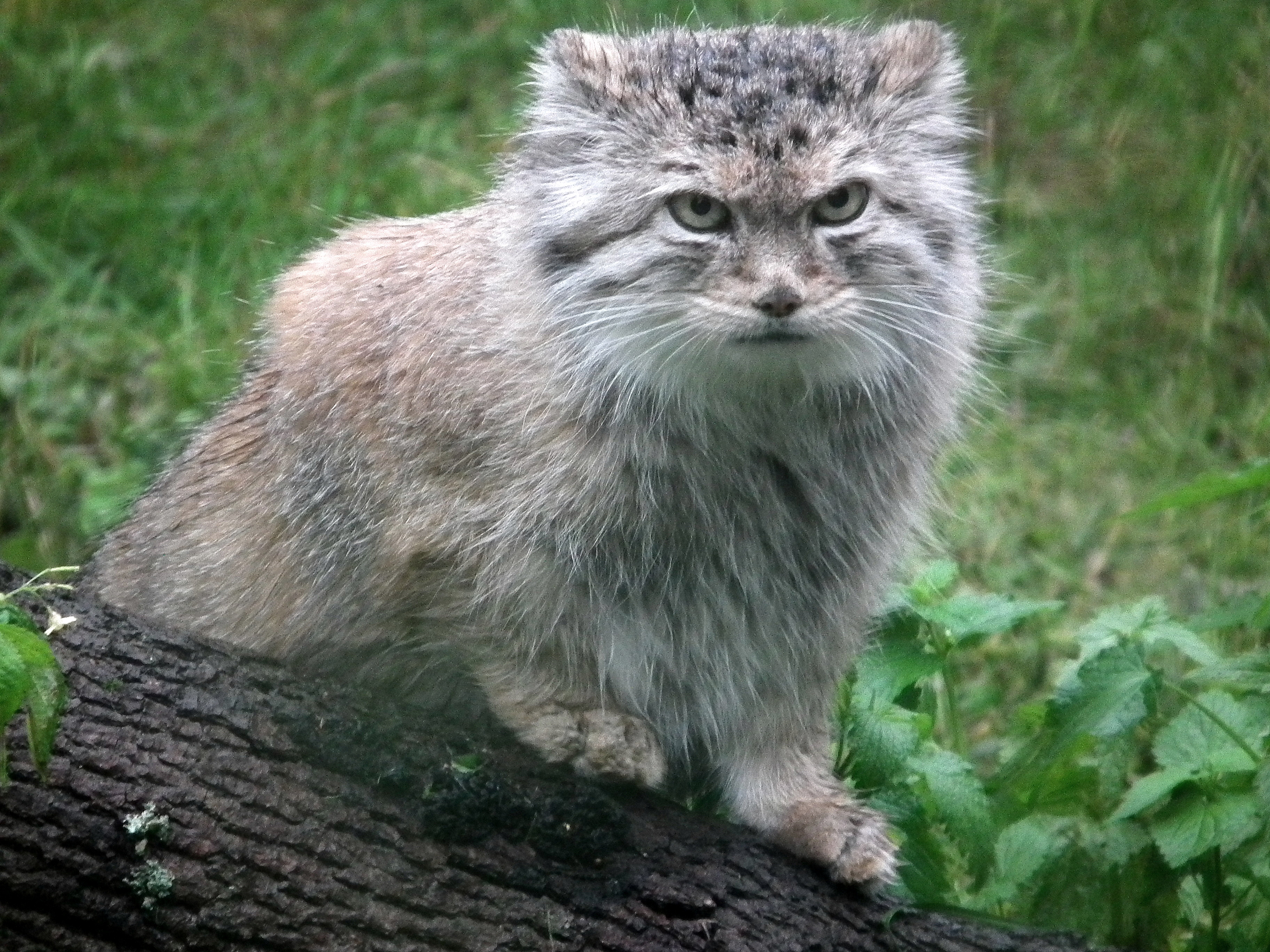 манул промок под дождём